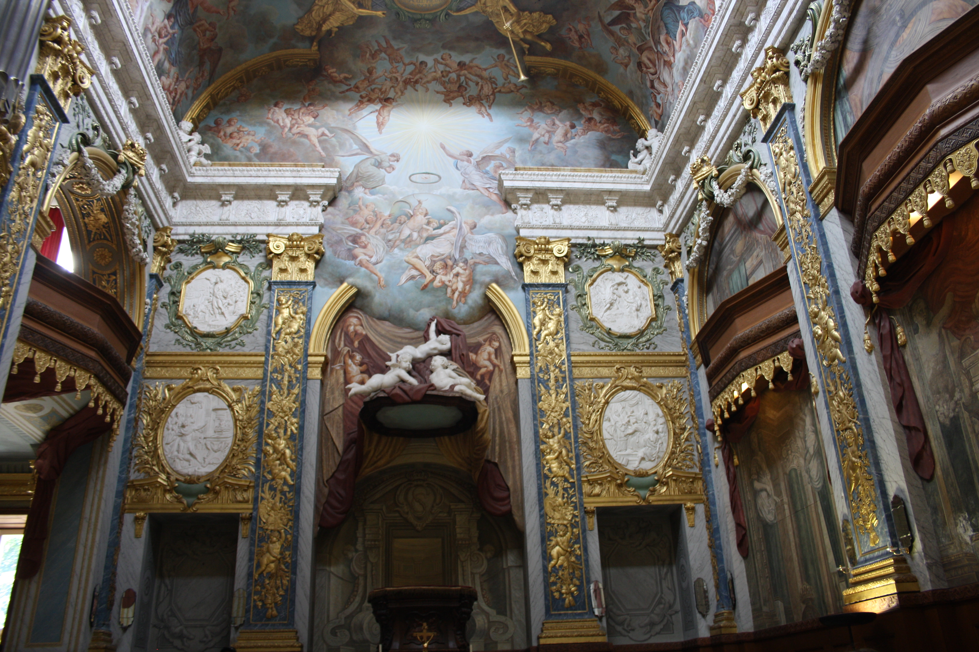 Schloss Charlottenburg, Schlosskapelle